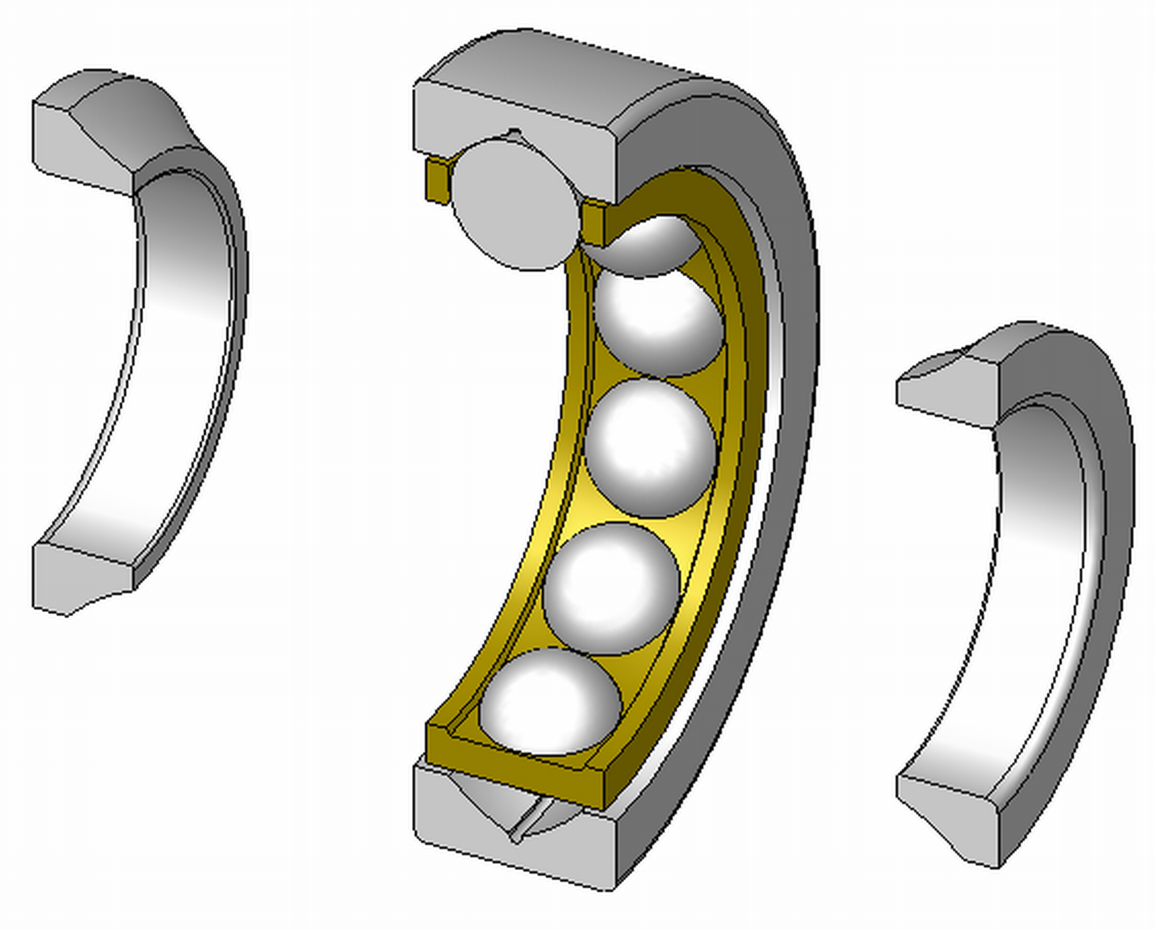 Vierpunktlager, geteilter Innenring, zerlegbar, Massivkäfig aus Messing, Explosionsdarstellung, 180°Schnitt, Hinweis: Innenaufbau des Lagers (insbesondere des Kaefigs) variiert je nach Hersteller und Baugroesse rolling contact bearings